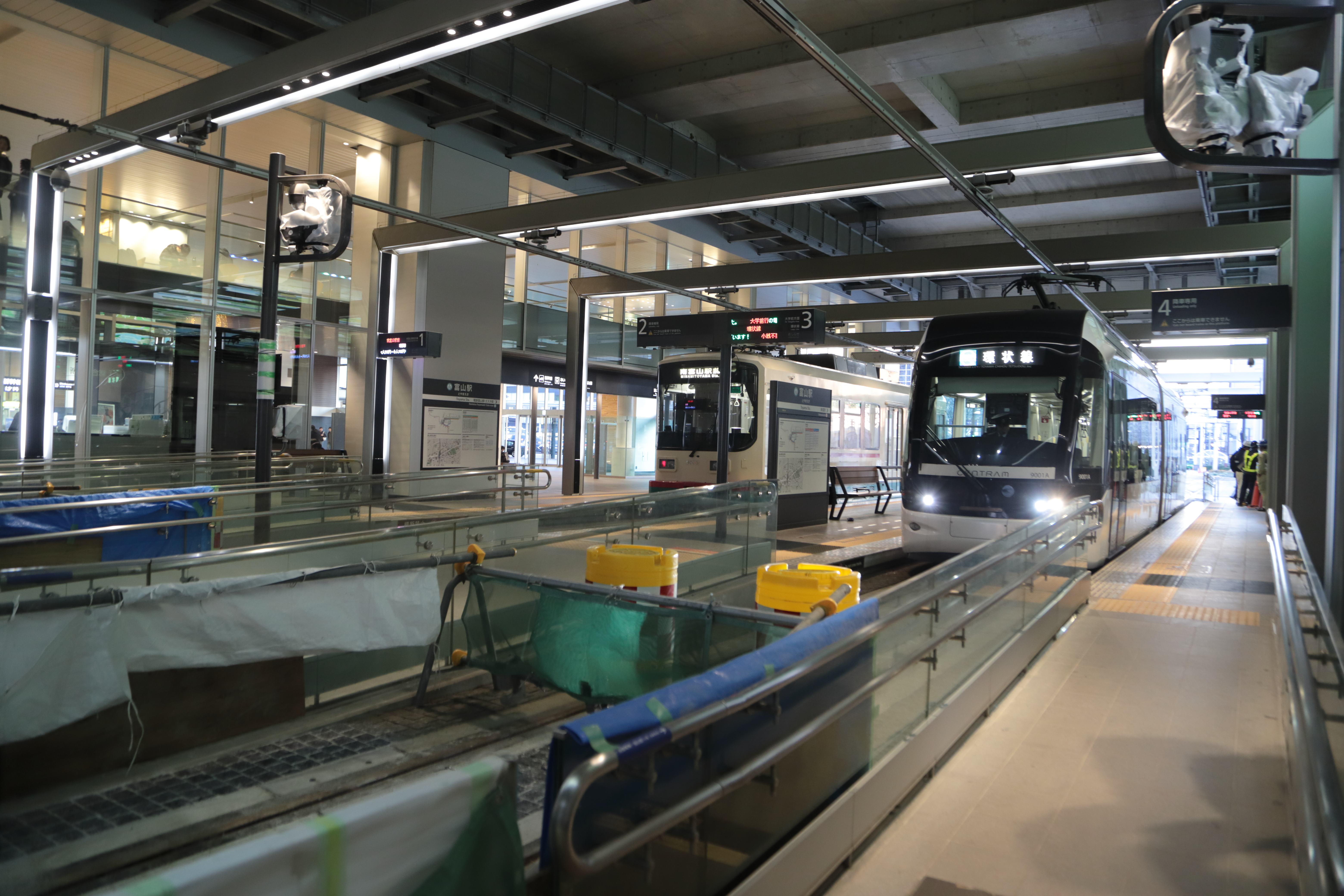 富山駅電停南側。分断されていた南北の路面電車の直通運転に向けて工事が実施されている。2019年12月12日撮影。